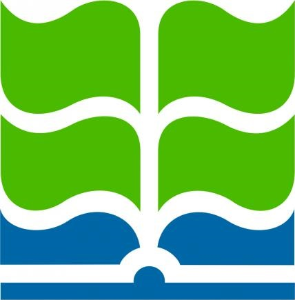 Logo de la Facultad de Agronomía